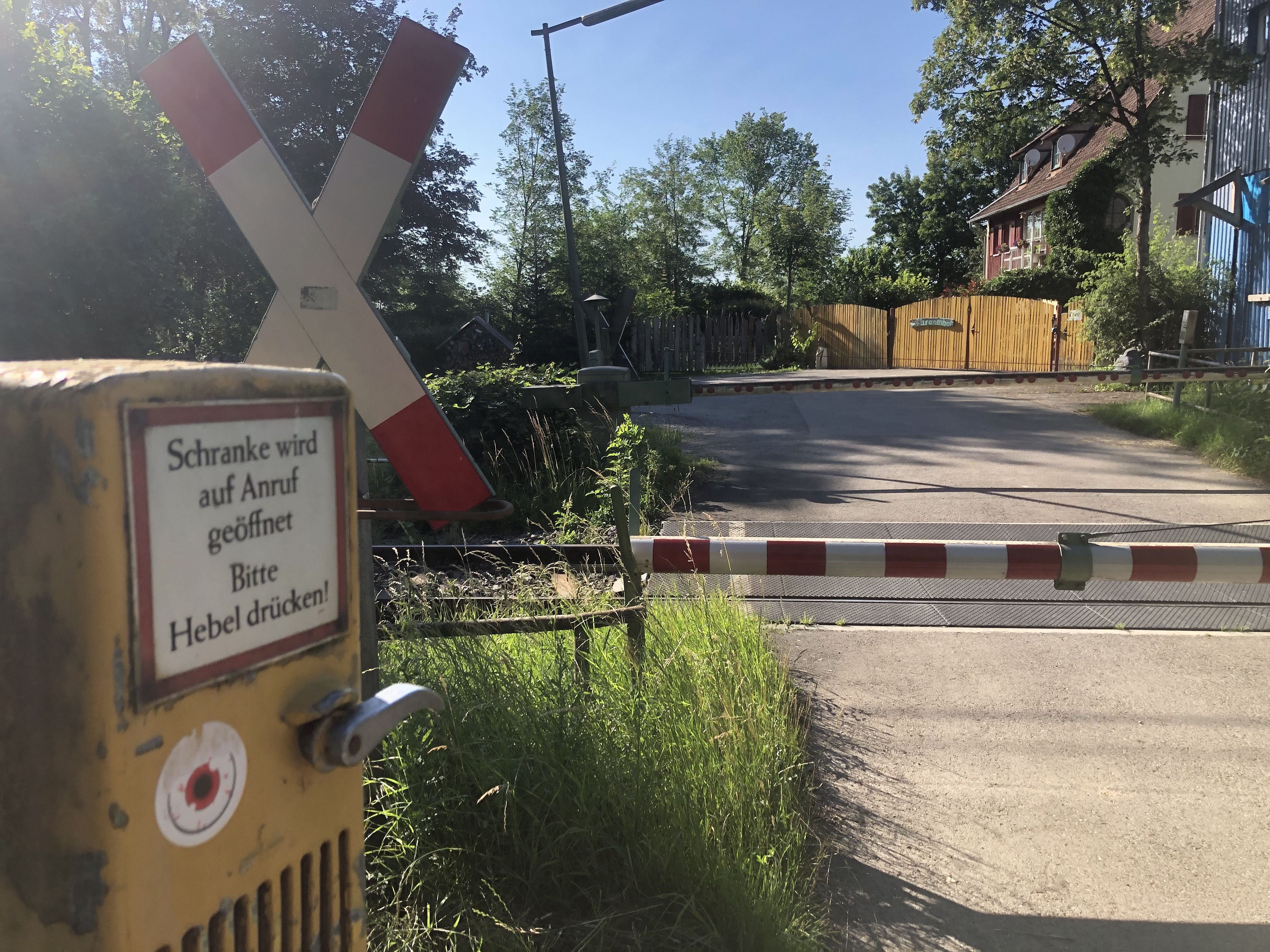 Bahnübergang beim Bahnhof Zollern (öffnet nur auf Anfrage)